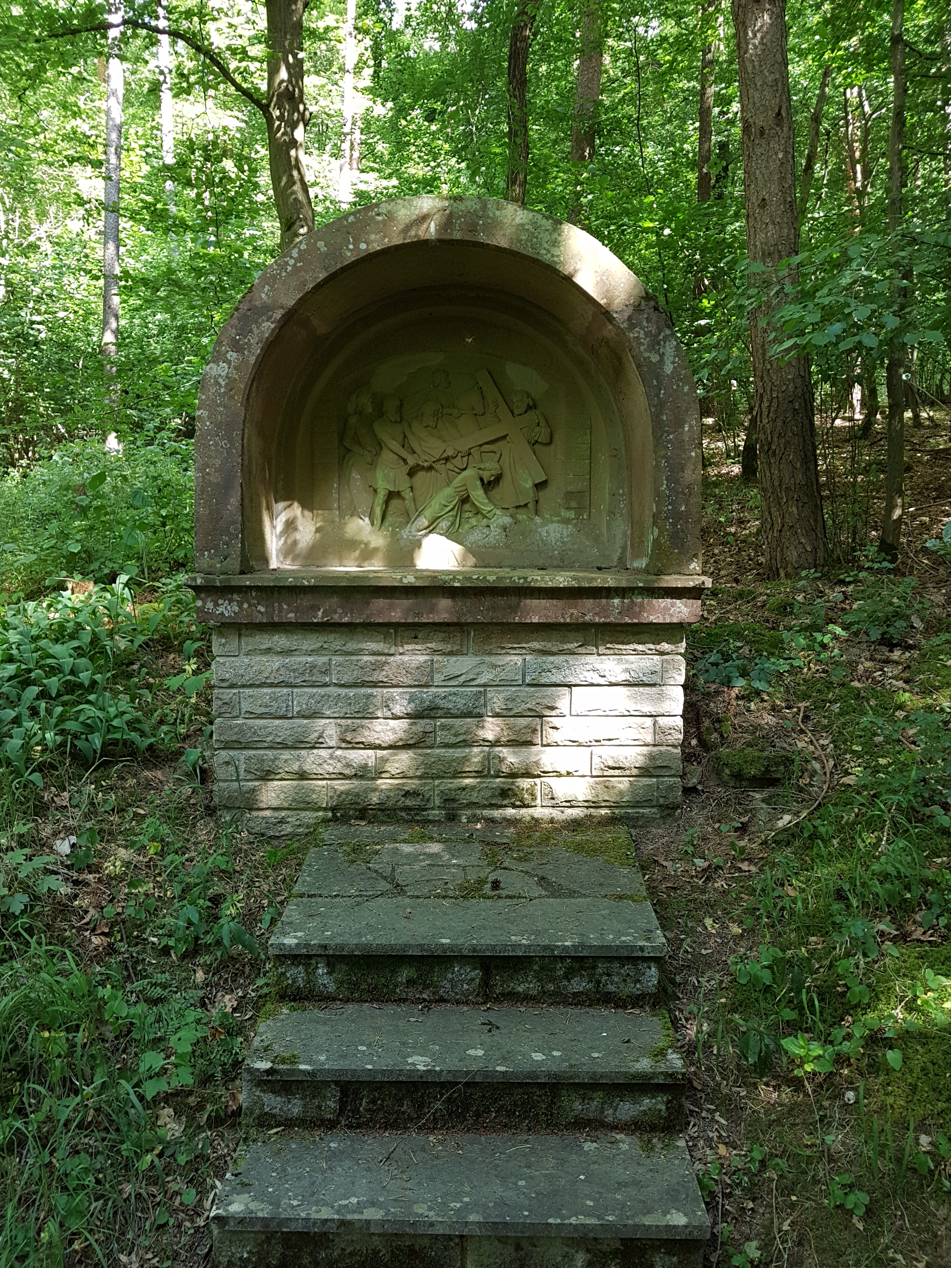 Kreuzweg zur Dittwarer Kreuzkapelle am Kreuzhölzle Bilder hochkant